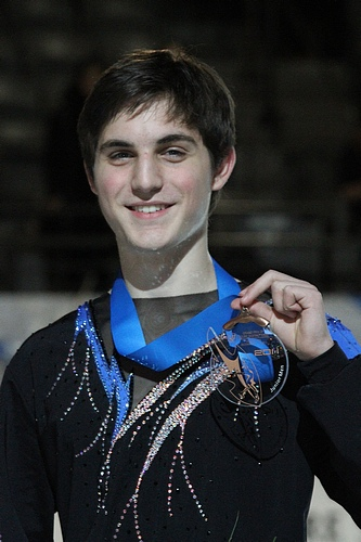 Джошуа Фаррис на финале Гран-при среди юниоров сеона 2011-2012